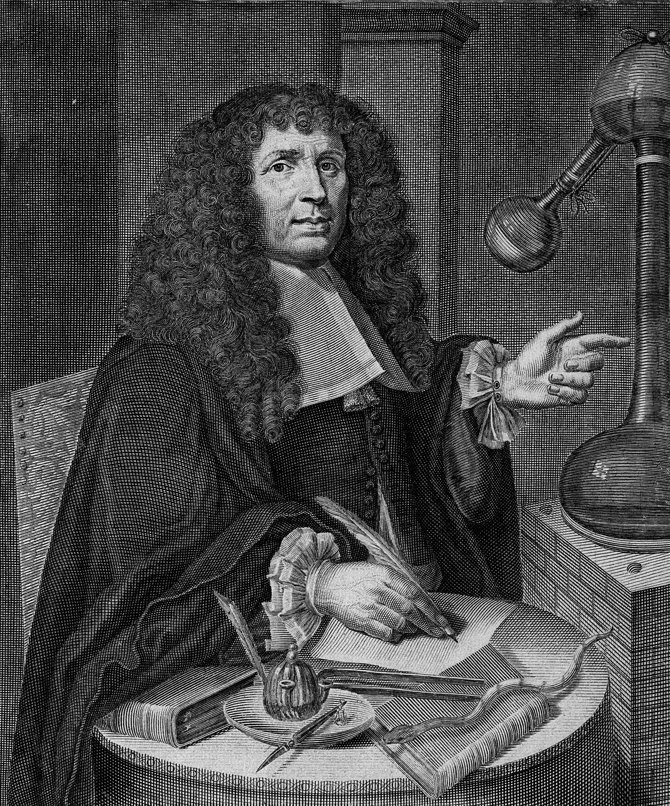 Portrait Moyse Charas